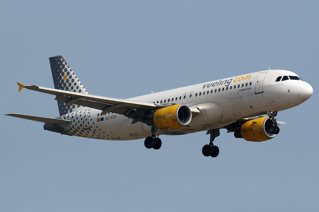 Barcelona El Prat (LEBL/BCN) Airport